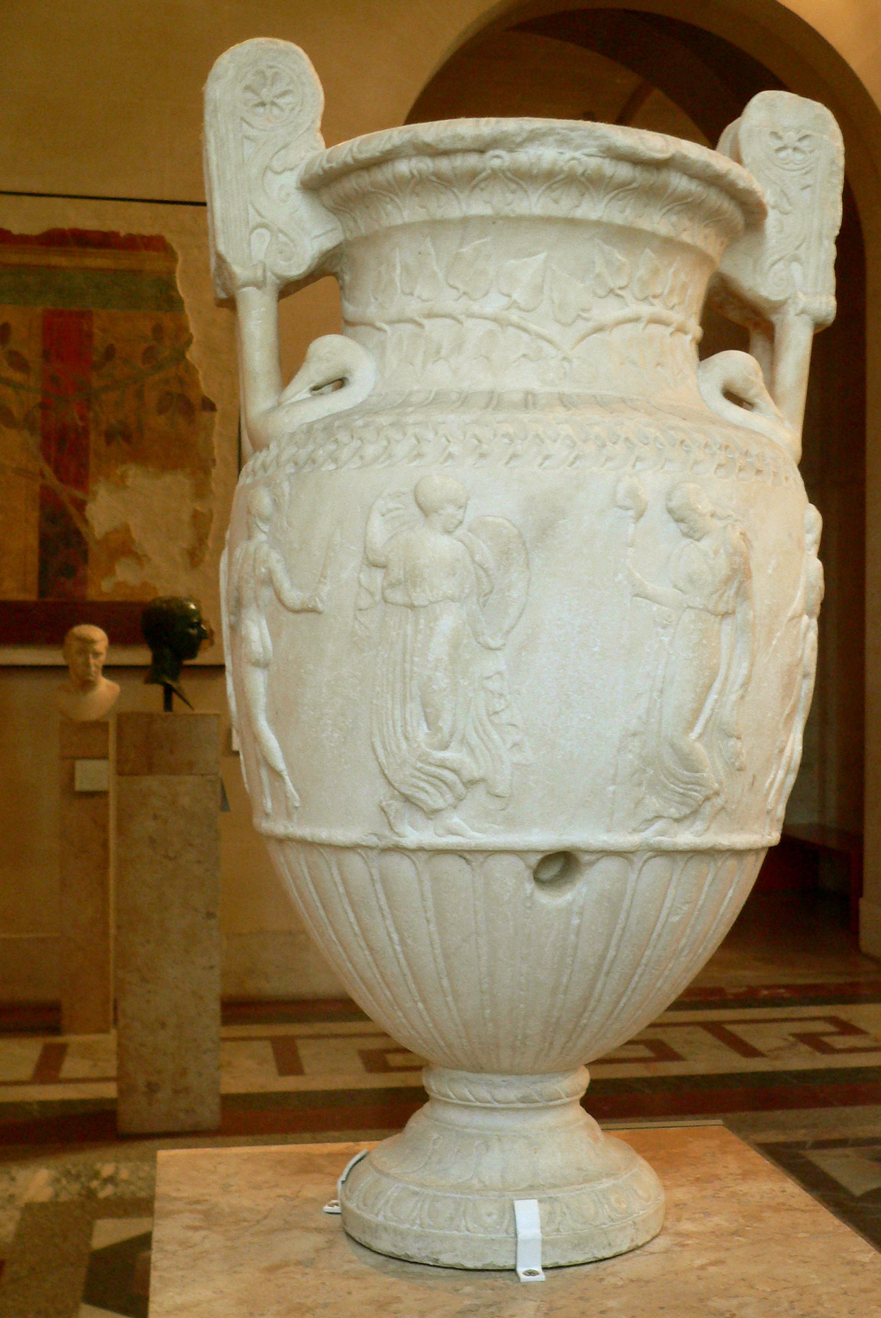 Vase dit de "Sosibios, vers 50 av.J.-C., marbre du Pentélique (Région d'Athènes)